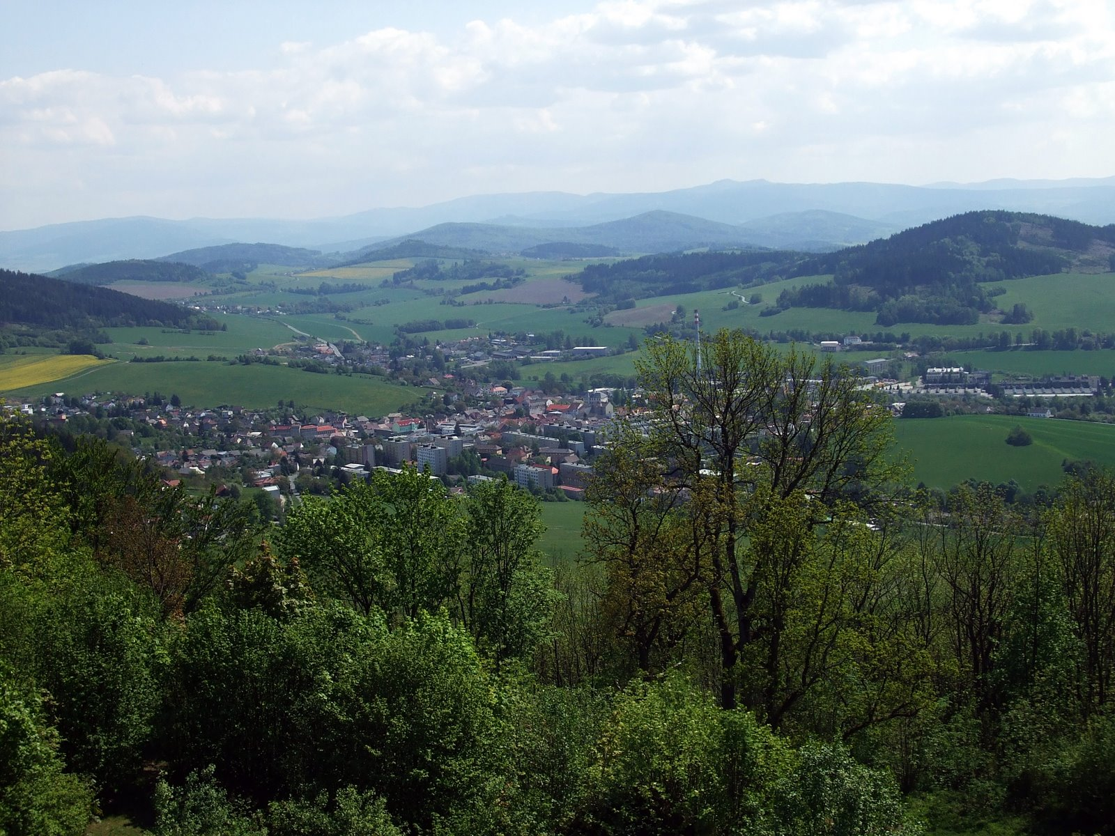 Pohled z věže Rýzmberku